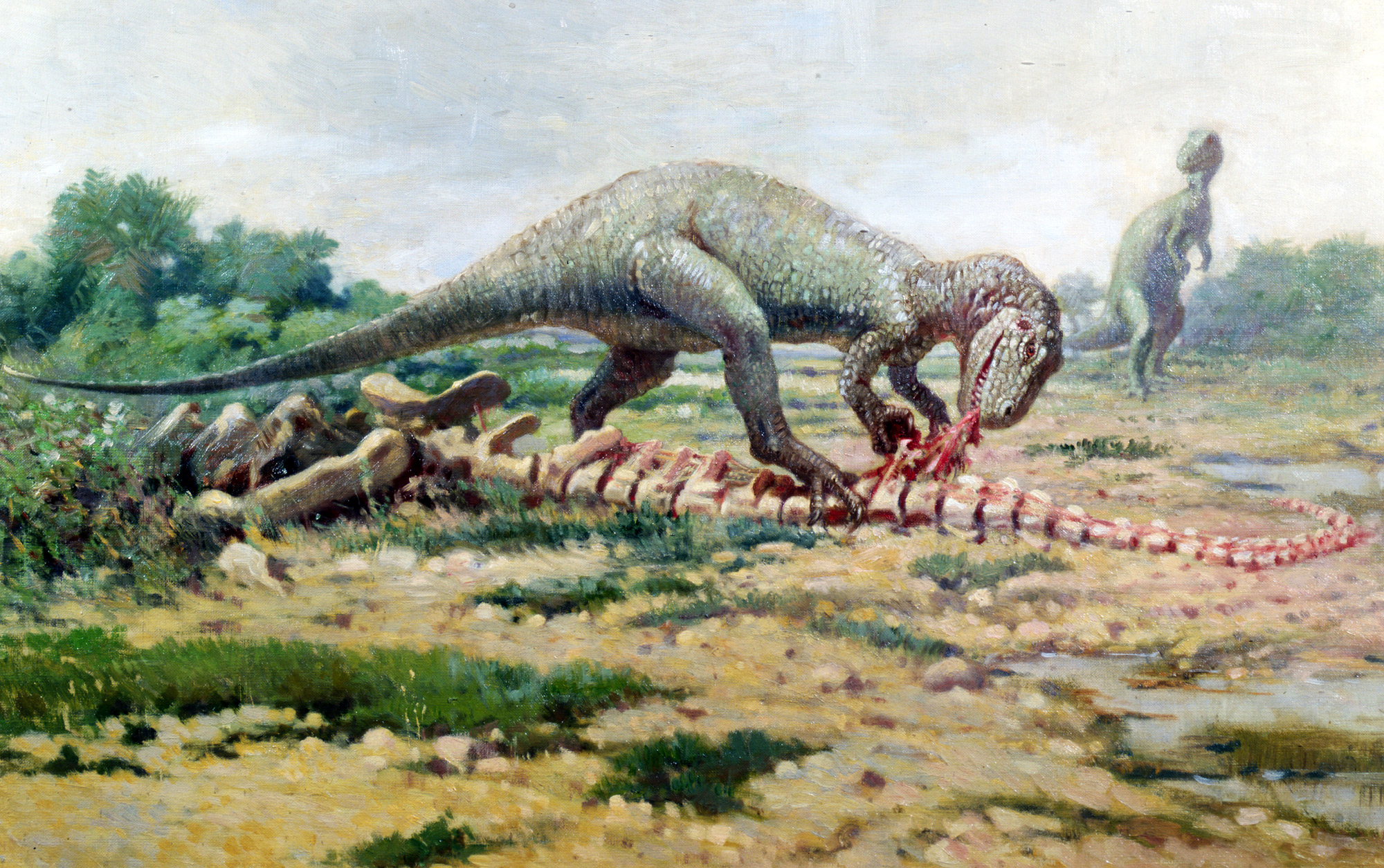 Antigua representación de un Allosaurus devorando carroña procedente del cadáver de un saurópodo. Taken from the Early Image Website ( "A sampling of my collection of Prehistoric Animal images published prior to 1923."